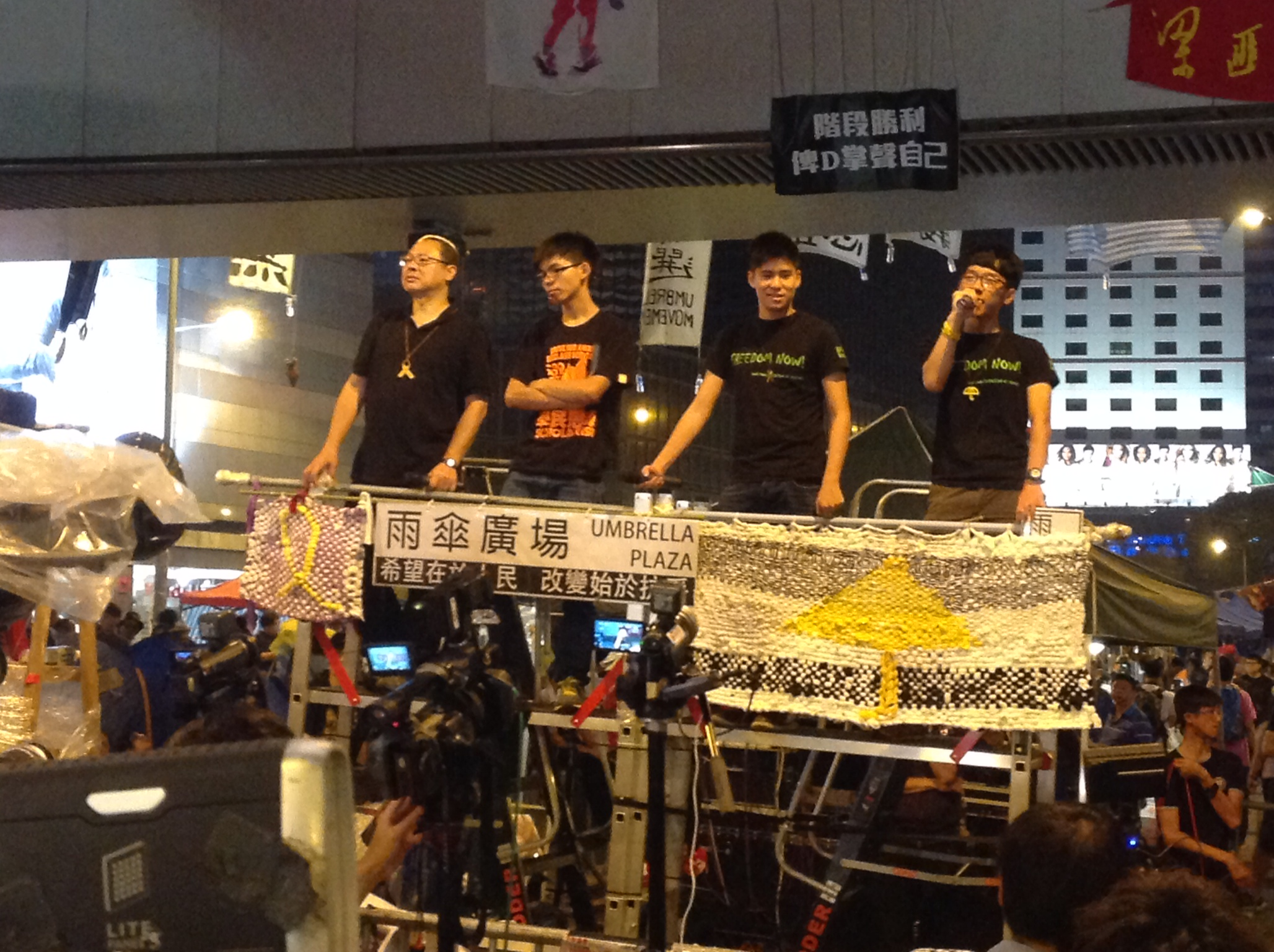 香港學生和市民發起的爭取真普選的佔領行動，10月27日踏入第30天。在佔領運動將滿一個月之際，參與占領運動的學聯、學民思潮、和平佔中、泛民以及民間團體所面臨的一個抉擇是運動的未來走向。